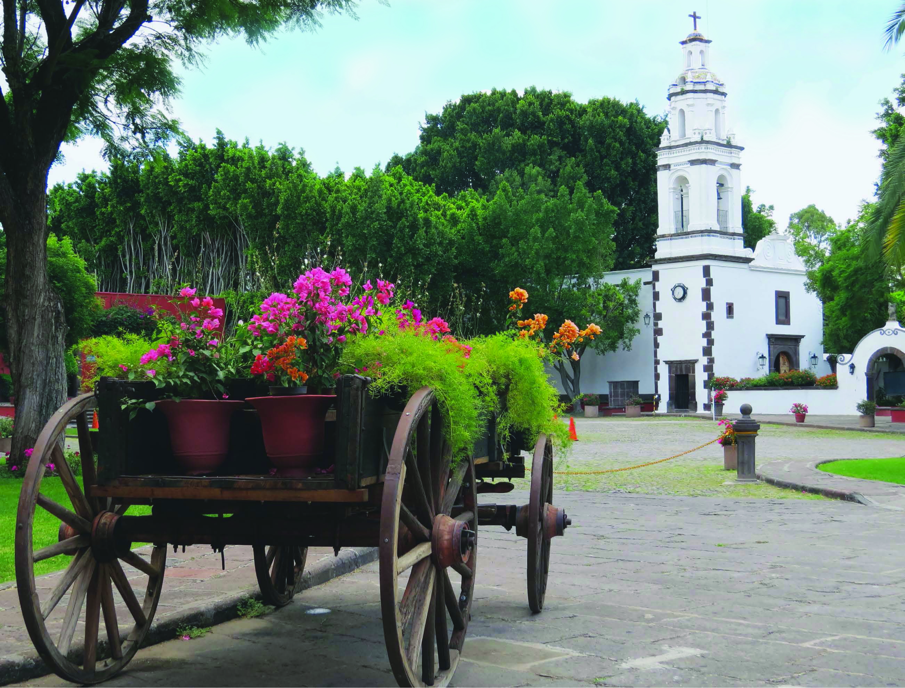 Hacienda Galindo, San Juan del Rio, Querétaro/ Galindo Ranch, Querétaro